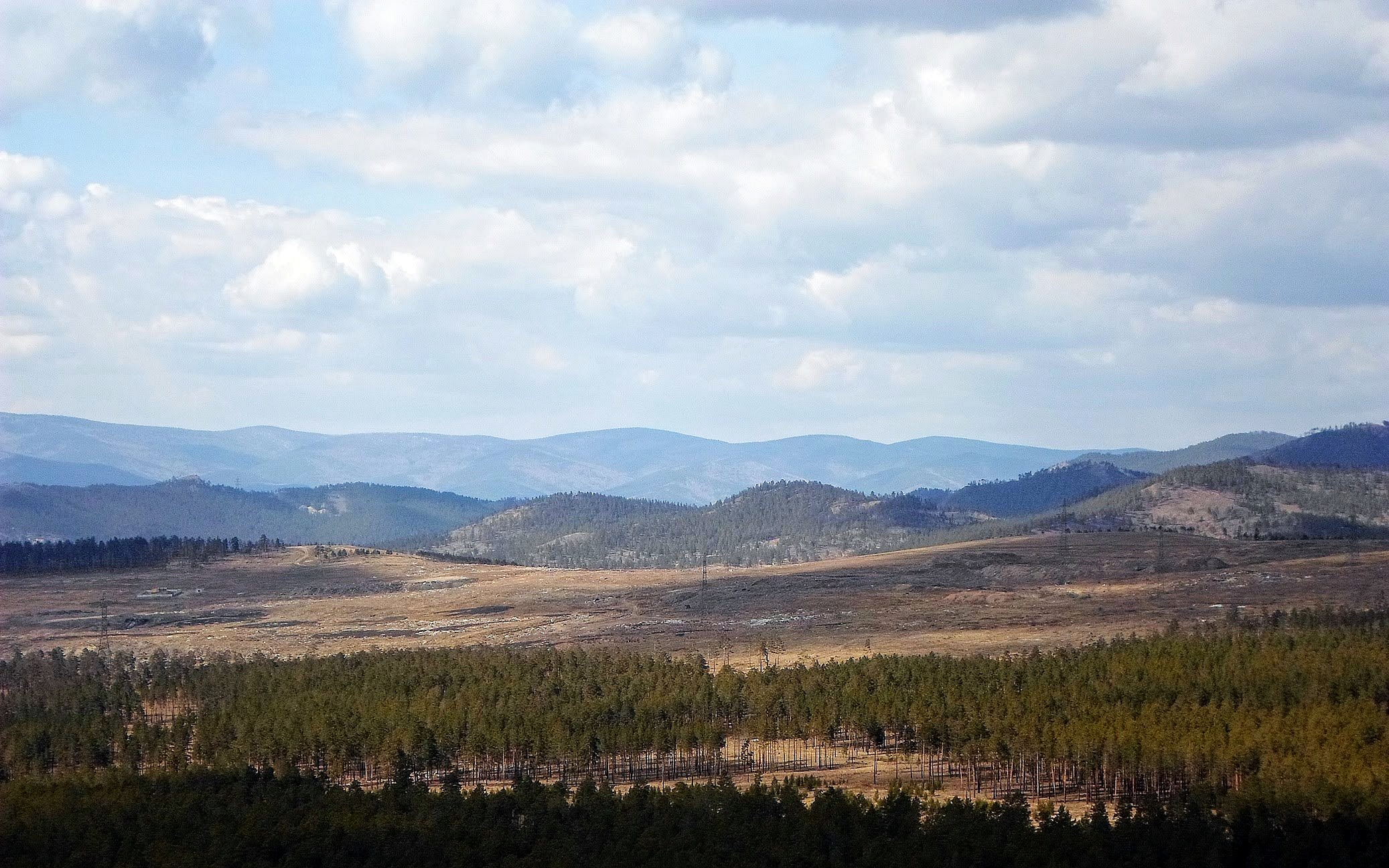 Вид на хребет Улан-Бургасы с Лысой горы, Улан-Удэ.